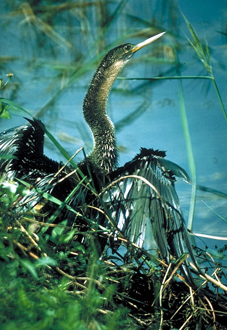 Wasservogel im Everglades National Park - Vogelart Anhinga (Schlangenhalsvogel, snakebird) Sehr ähnlich dem Kormoran mit längerem Hals und spitzem Schnabel. Link auf engl. Wikipedia National Park Service Der Körper des Schlangenhalsvogels ist beim schwimmen komplett unter Wasser, nur der sehr lange Hals ragt aus dem Wasser, was bei ungenauem hinsehen für Ähnlichkeit mit einer Schlange sorgt.